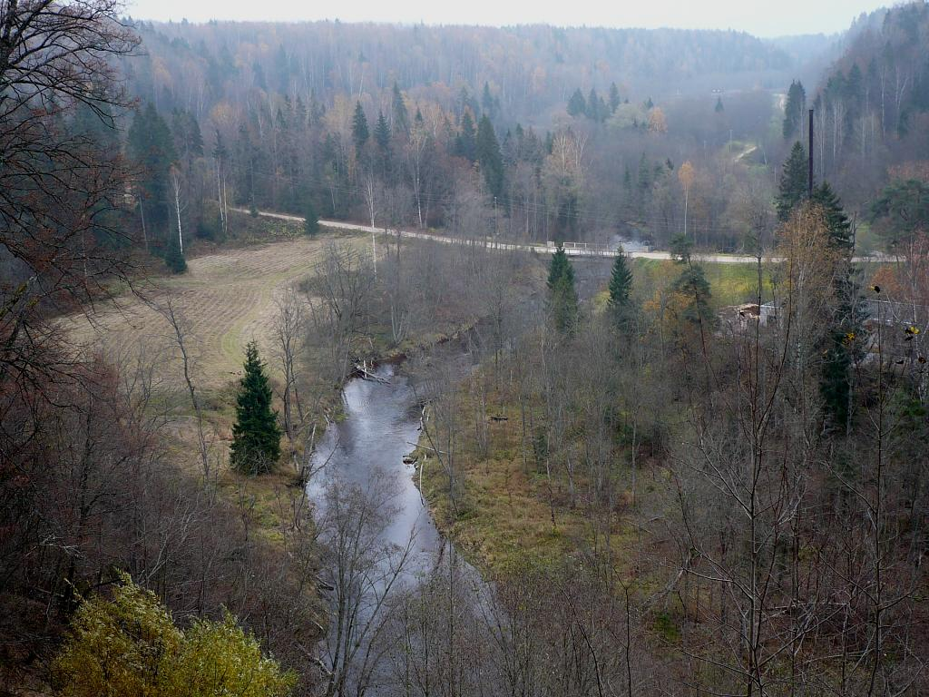 Ainavu kraujas panorāma. 2007-10-27